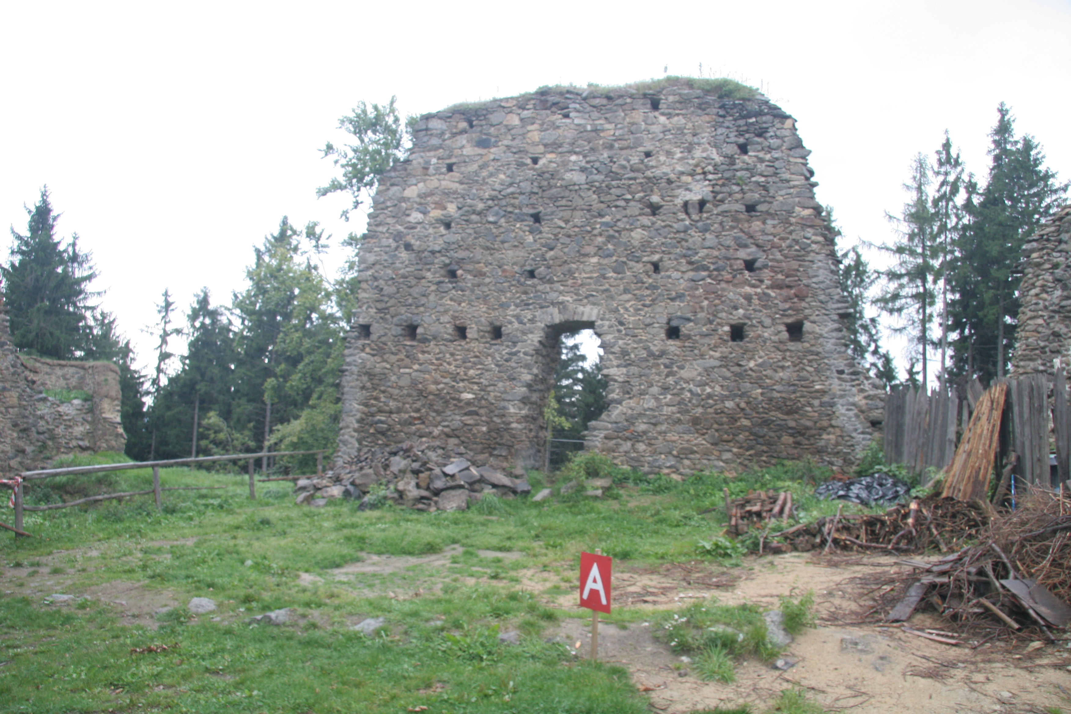 Hrad Orlík, zřícenina (Rozkoš), Rozkoš, Rozkoš